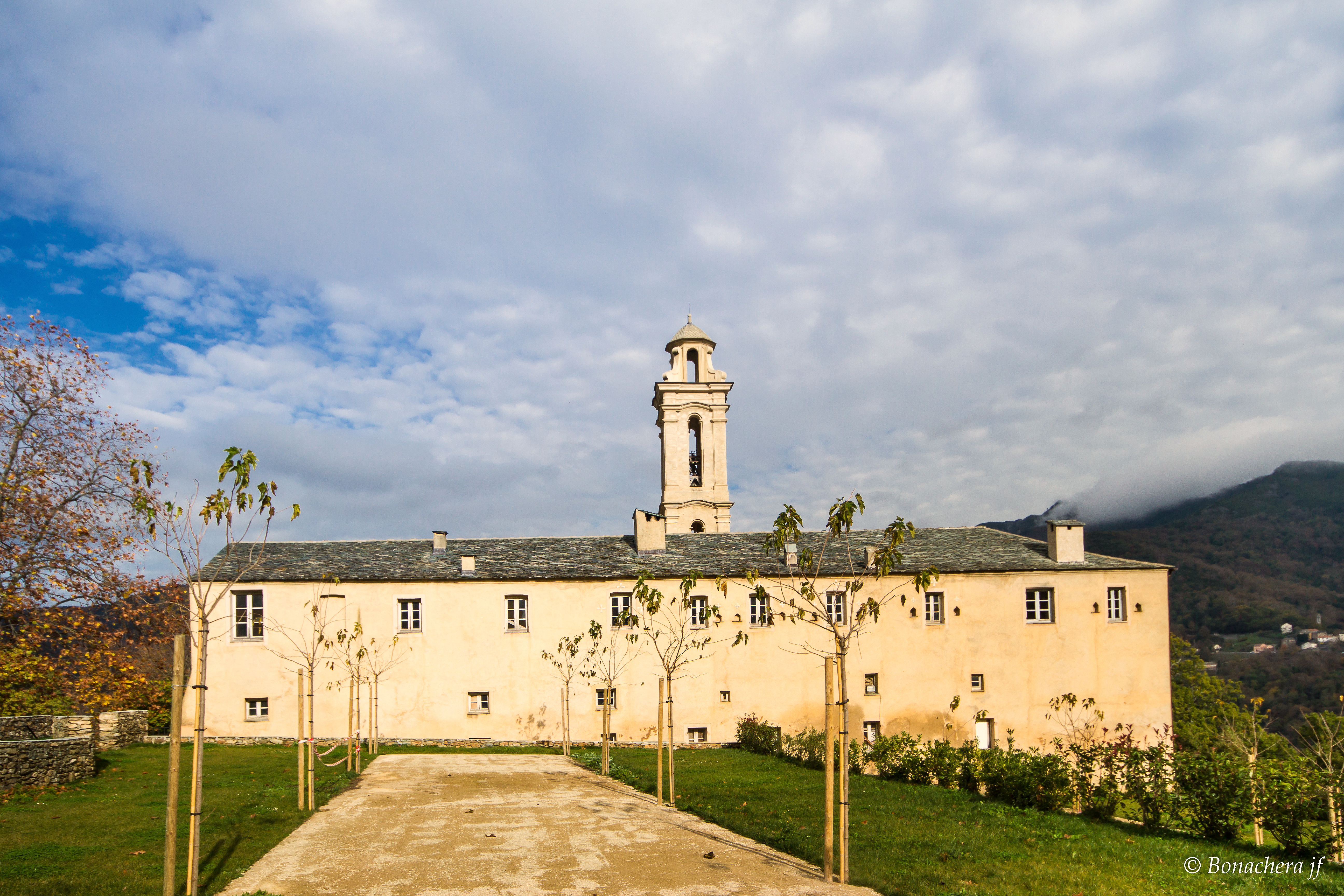 Piazzali, Castagniccia (Corse] - Vue du couvent depuis le chemin d'accès